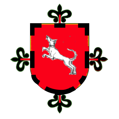 Armas de DEZCALLAR sobre cruz de Montesa